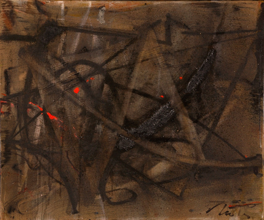 Peinture de Piotr Szmitke